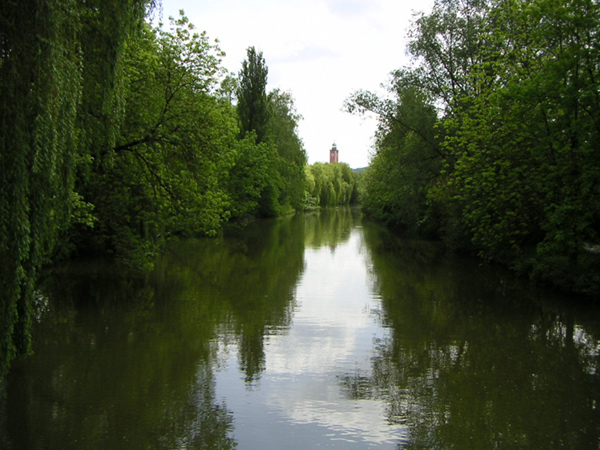 Blick auf den Fluss Altmühl bei Eichstätt